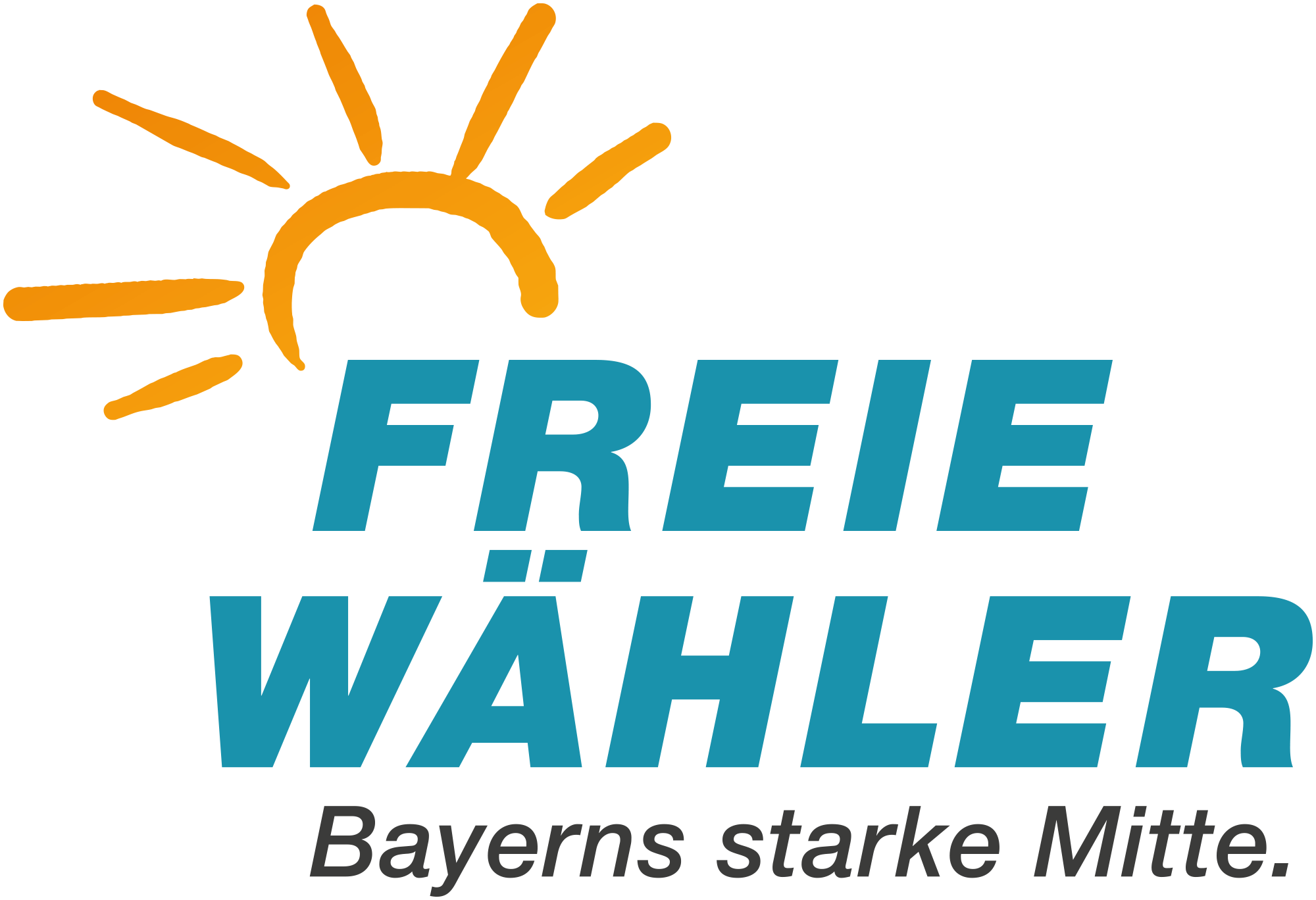 Das Logo der Freien Wähler Bayern seit 2018 in der zweizeiligen Variante.